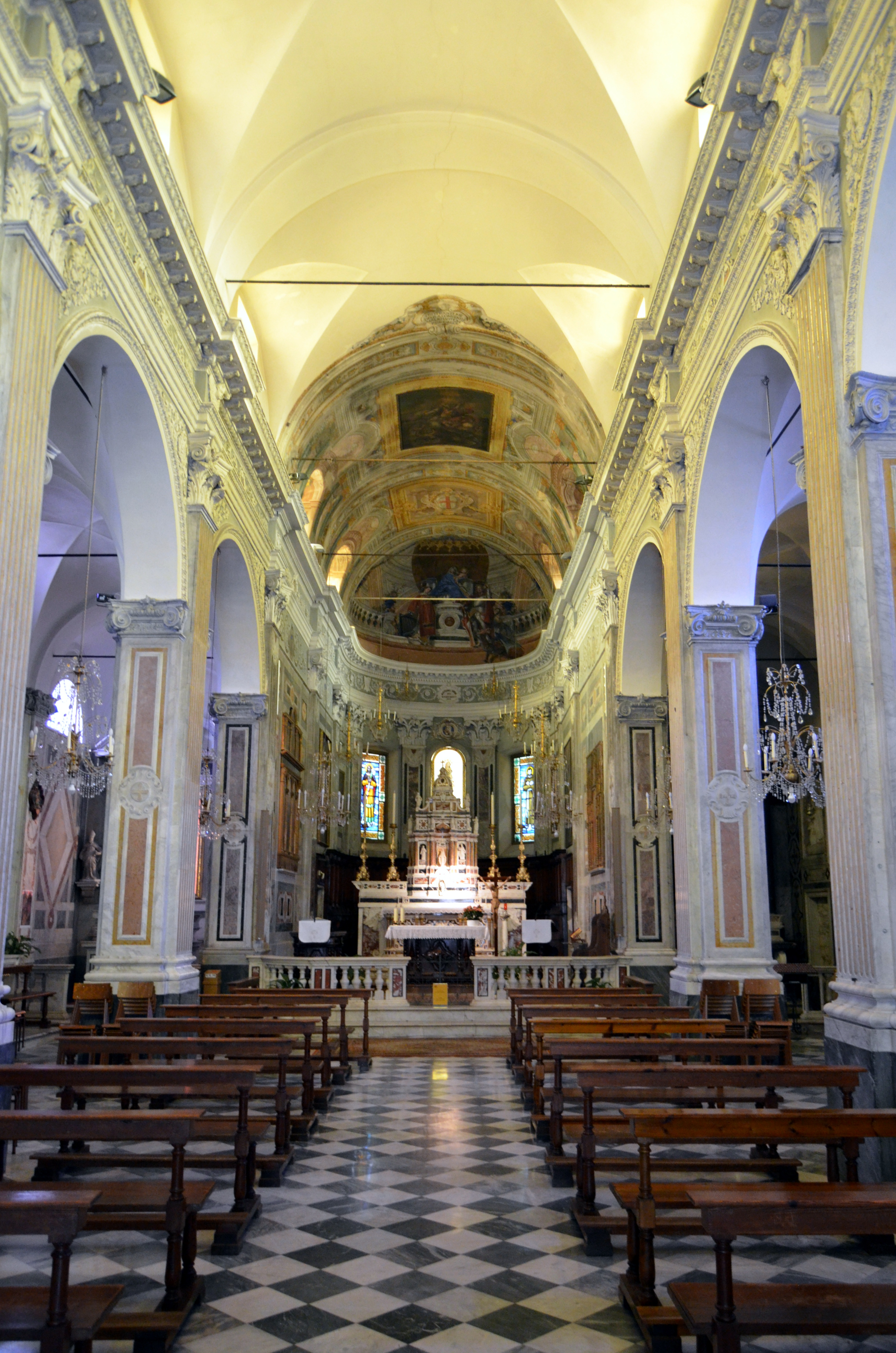 Chiesa di San Giorgio di Moneglia, Liguria, Italia